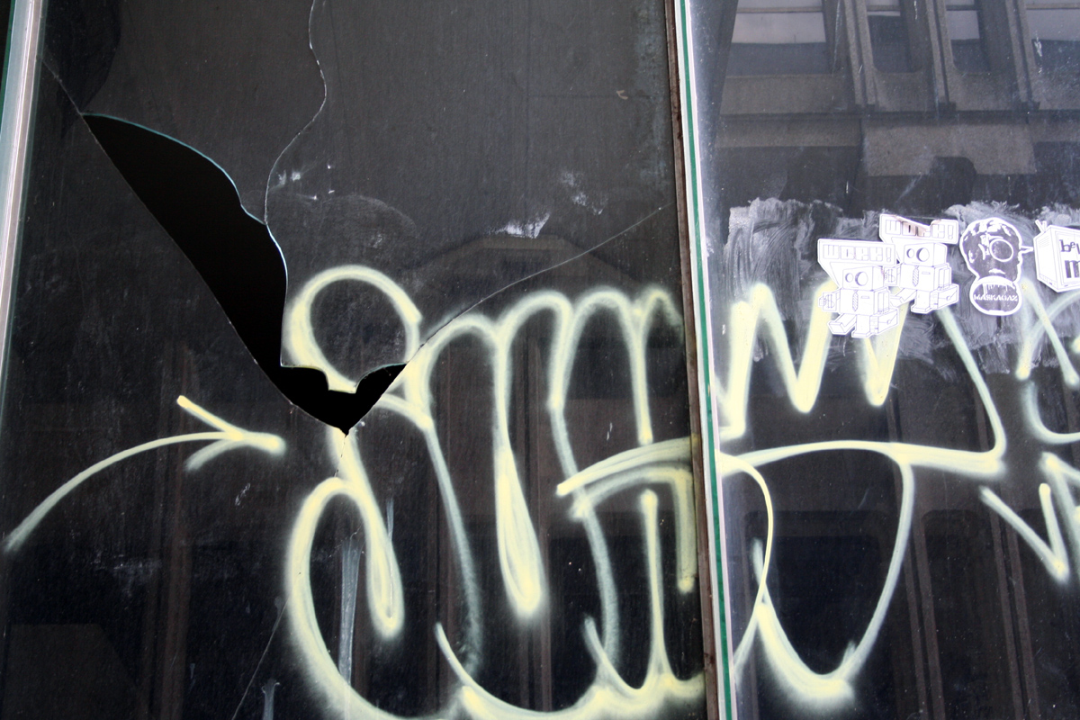 le "Palais de congrès" (Congress palace), détail, Rouen, France